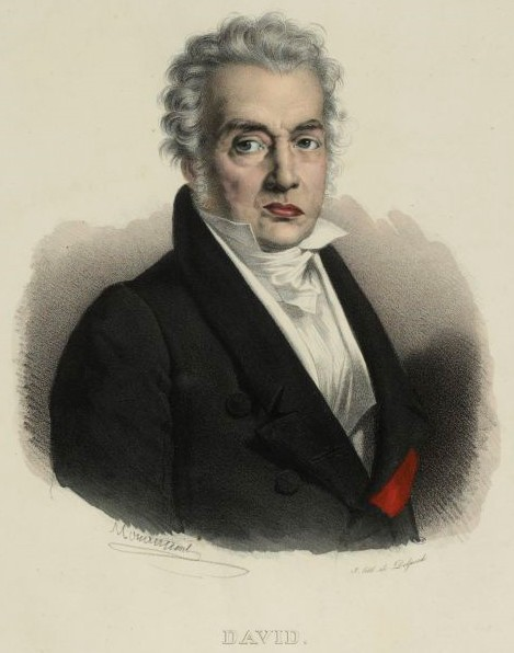 Estampe du peintre Jacques-Louis David par François Delpech (1778-1825). Musée de la Révolution française, N° inventaire : 1984-714.